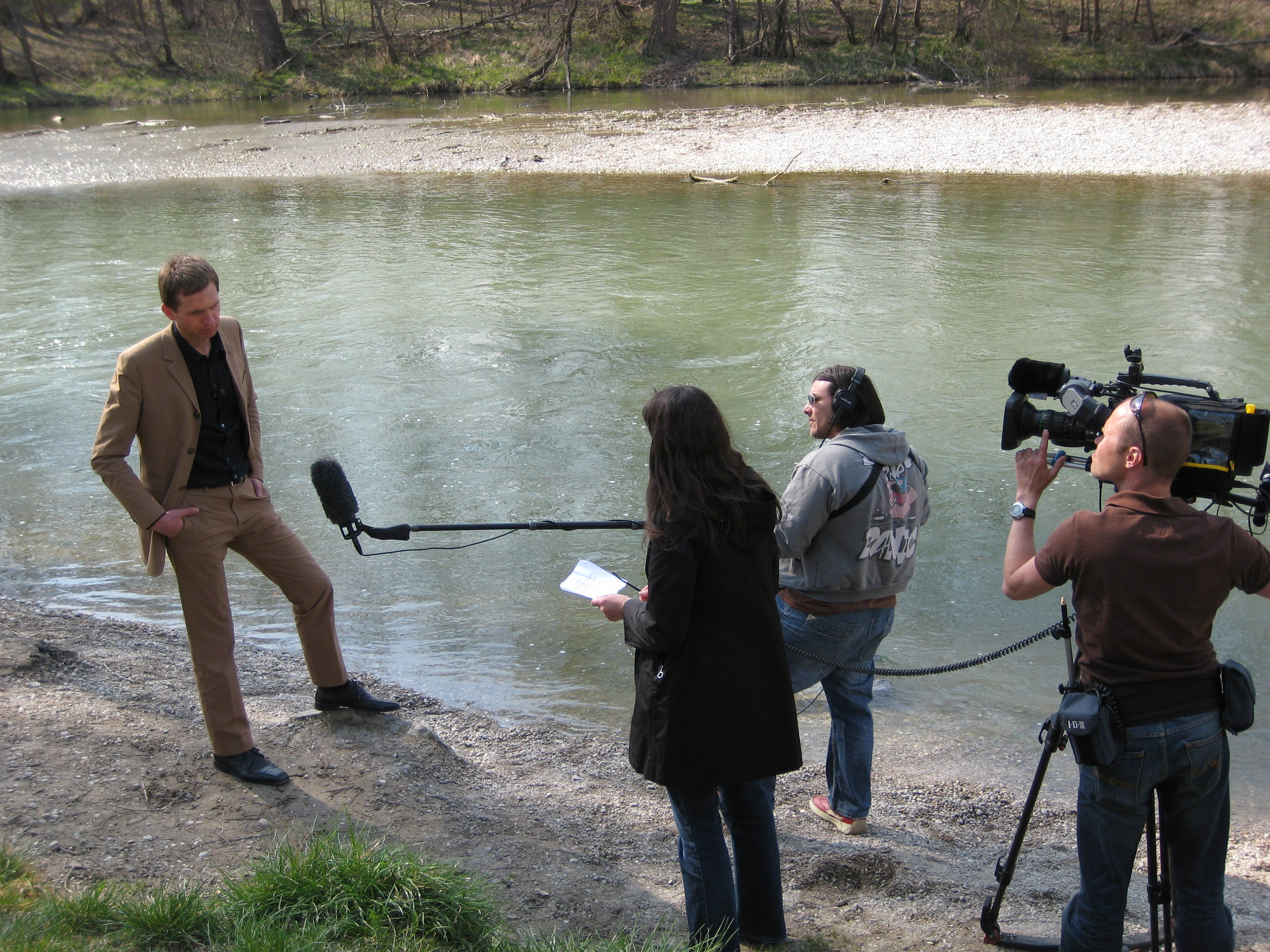 Klaus Schnellenkamp with German Television ARD-Brisant